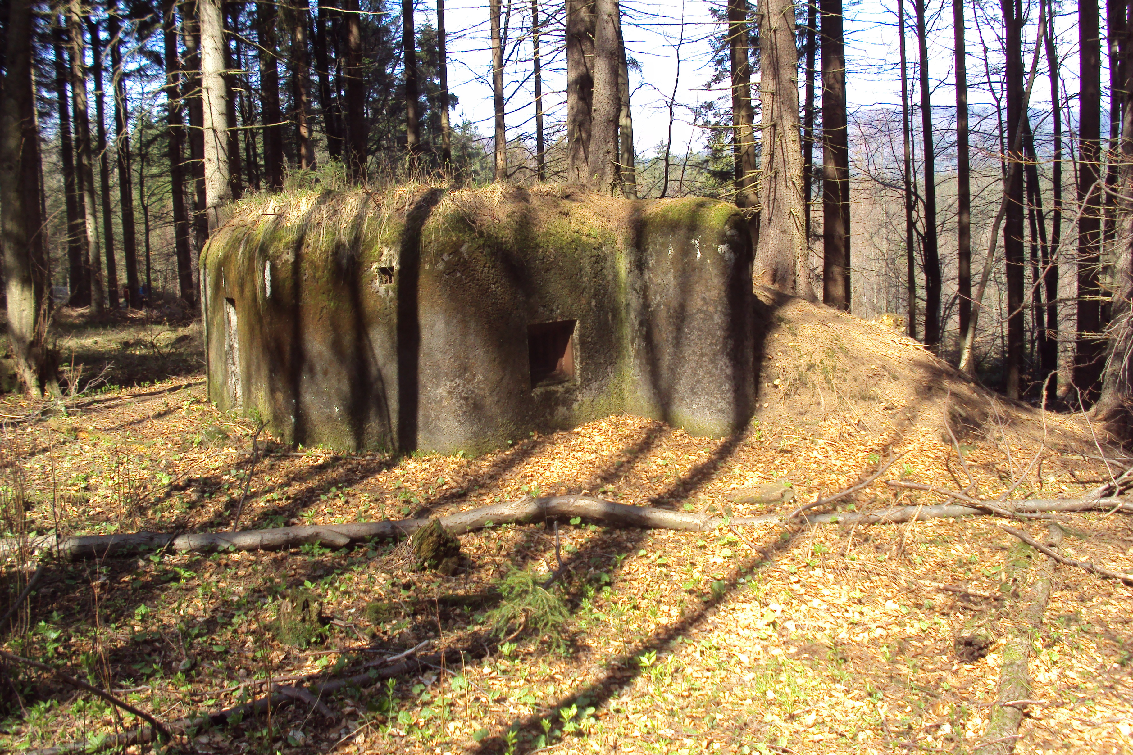 Jeden z mnoha řopíků v Lužických horách, pod Suchým vrchem nedaleko přehrady a jeskyně Naděje